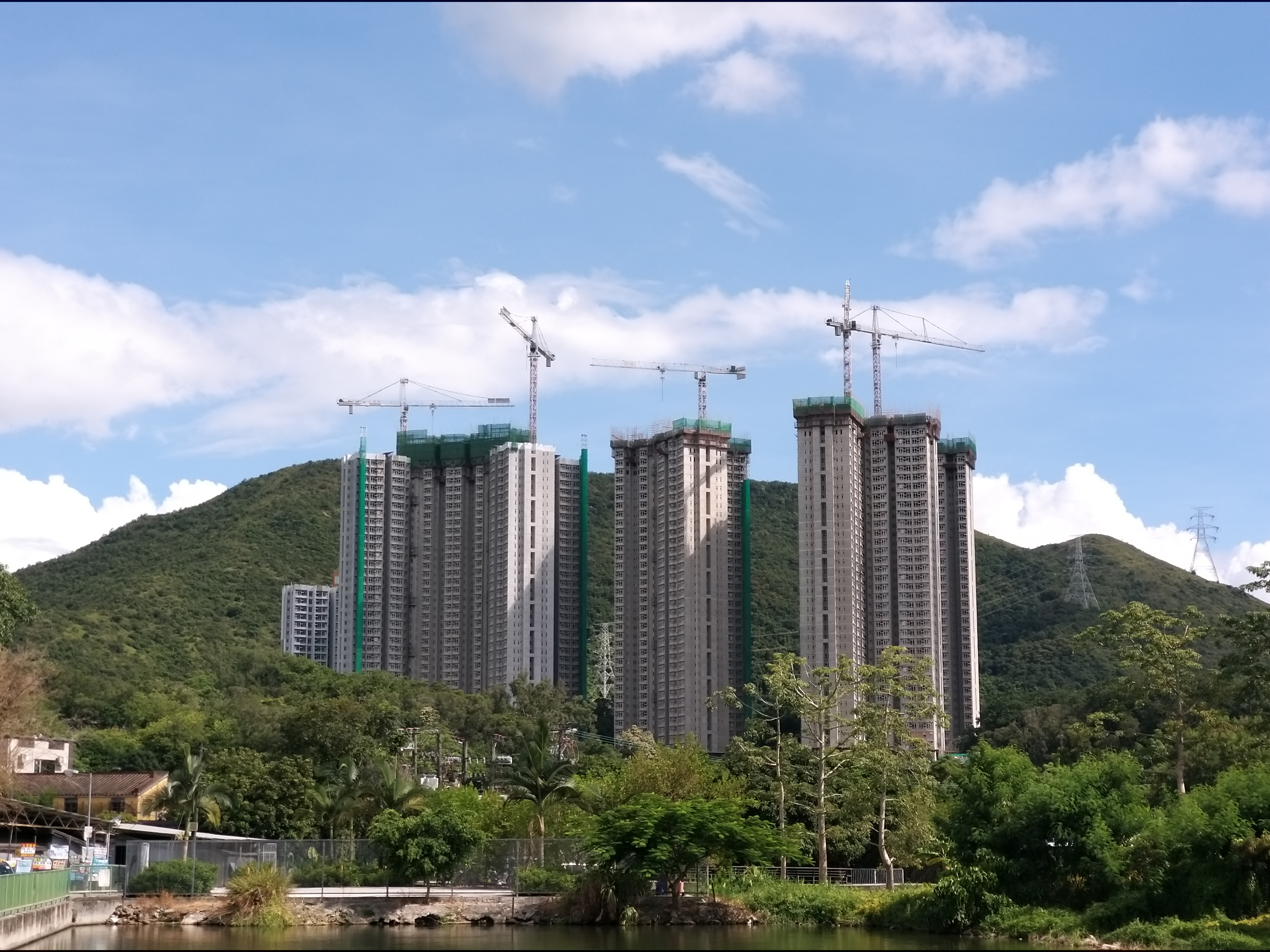 A-C座亦已開始封頂